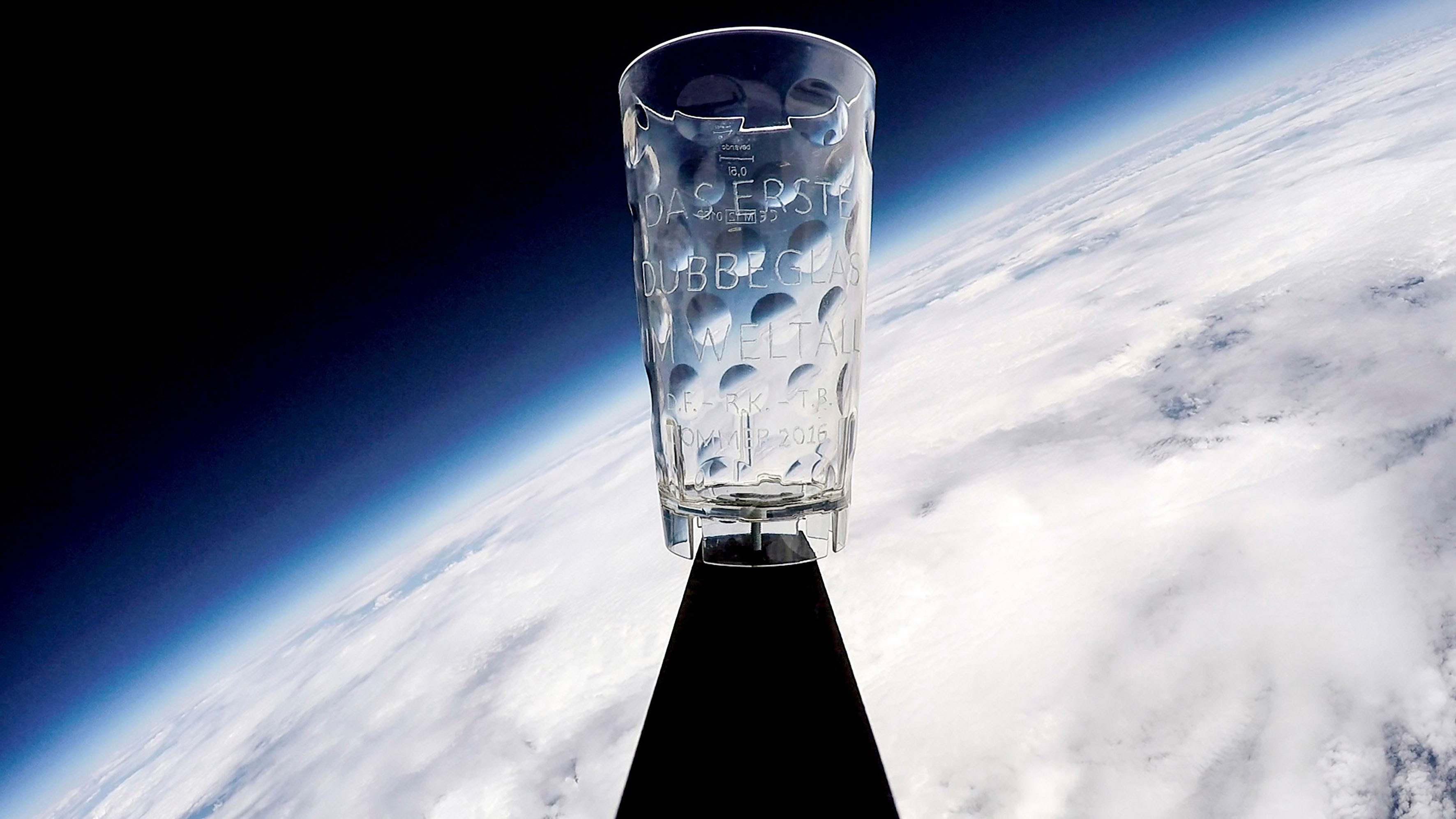 Das erste Pfälzer Dubbeglas in der Stratosphäre, in ca. 33 Kilometern Höhe. 03. Juli 2016. Bild vom Spacedubbe-Projektteam: Thomas Butsch, Robert Kwiatek, Dirk Fellhauer